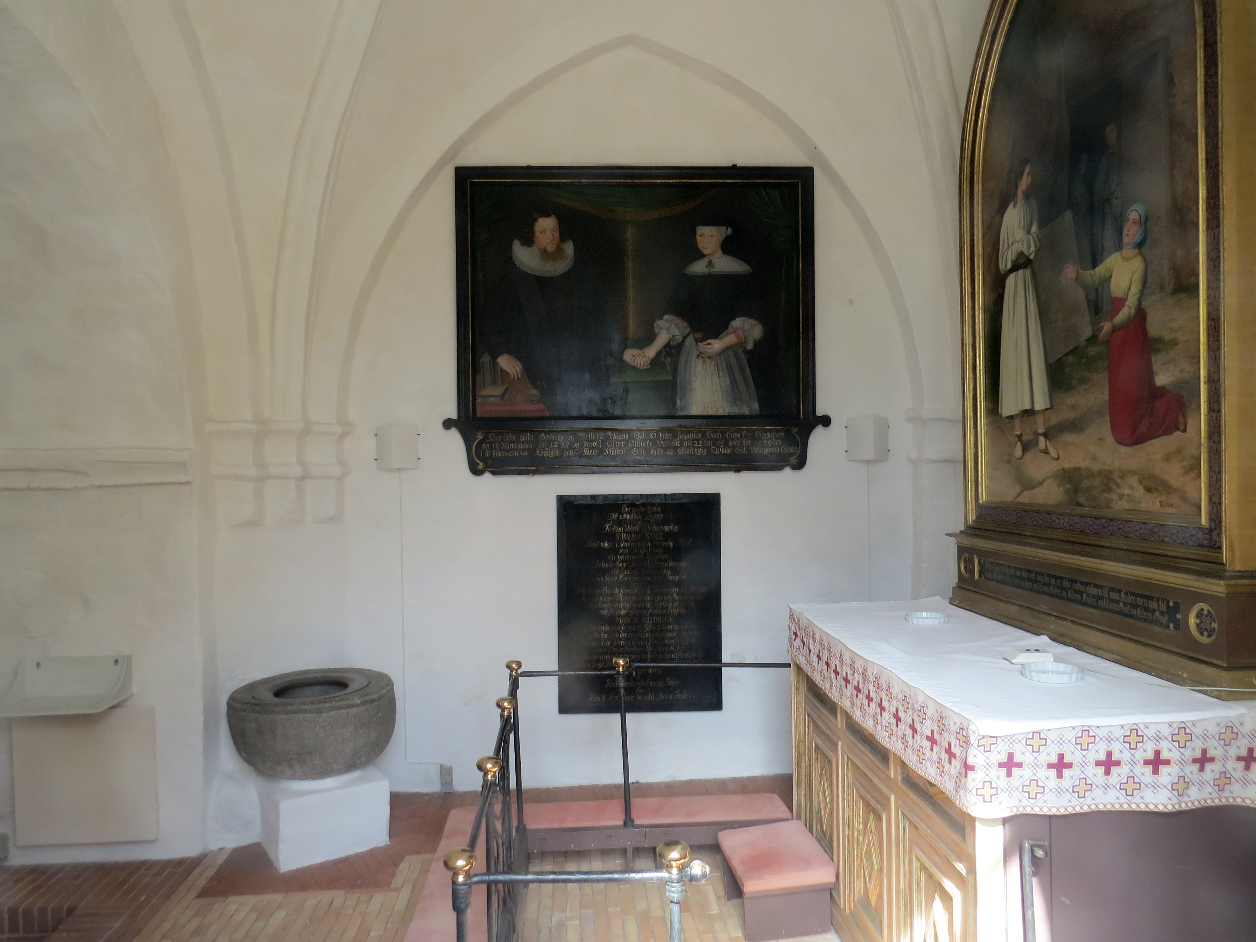 Interør fra Snostrup Kirke, Sjælland